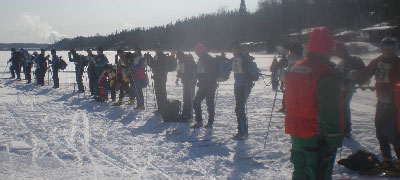 Lähtö.